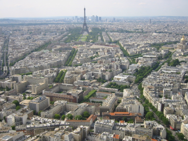 Restaurant le ciel de Paris de la Tour Montparnasse à Paris